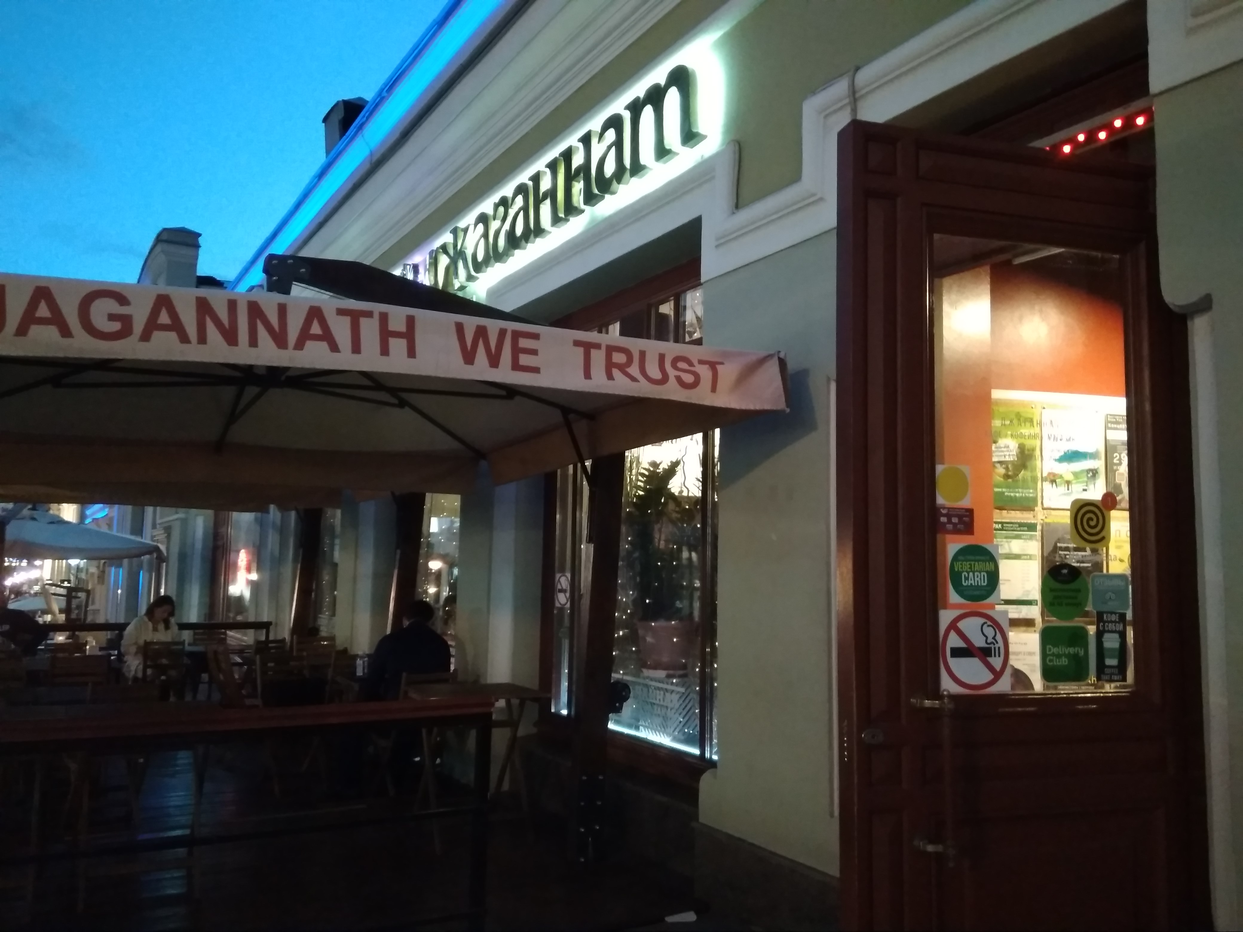 Кафе «Джаганнат» на улице Кузнецкий Мост в Москве